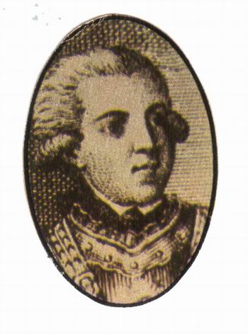 Herzog Ludwig von Württemberg (* 30. August 1756 in Treptow an der Rega; † 20. September 1817 in Kirchheim unter Teck) war ein württembergischer Prinz sowie General der Kavallerie.